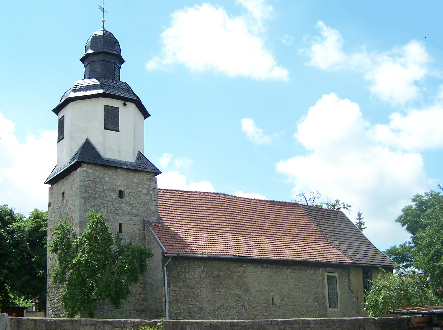 Die Kirche in Ebenheim, Landkreis Gotha - nördliche Fassade.